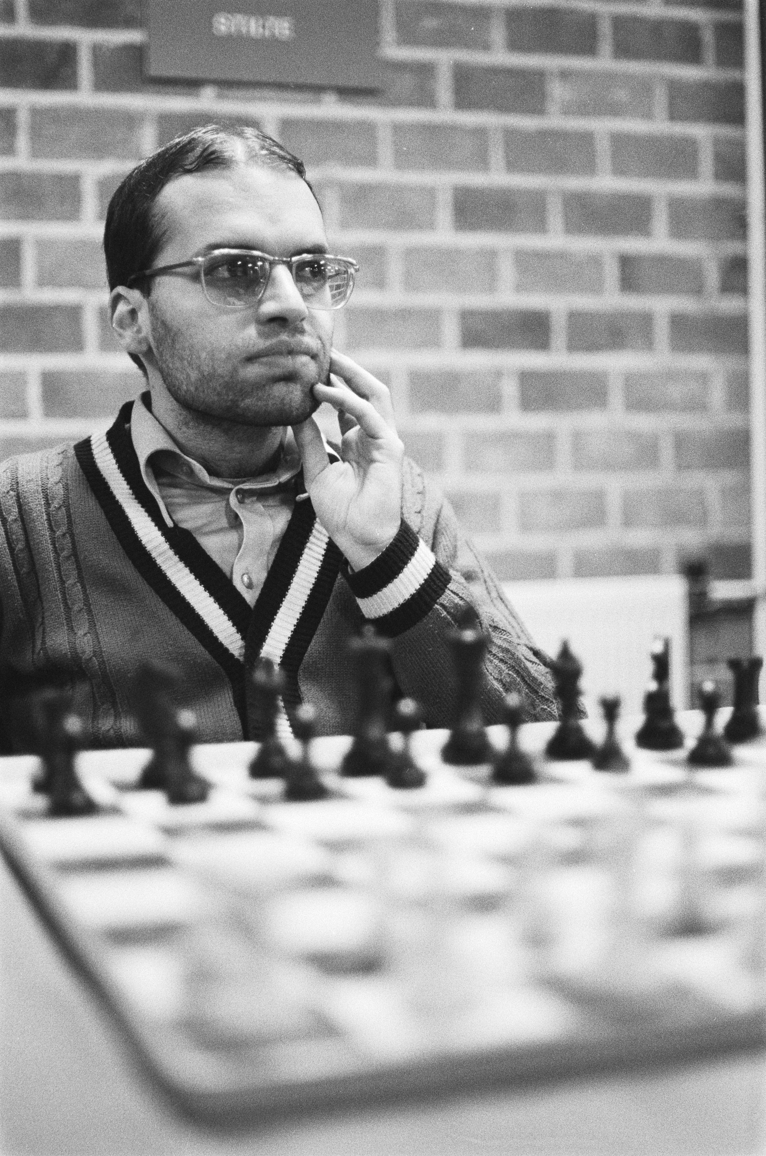 Collectie / Archief : Fotocollectie Anefo Reportage / Serie : [ onbekend ] Beschrijving : Hoogovenschaaktoernooi, 5e ronde; Mecking Datum : 25 januari 1978 Trefwoorden : schaken Instellingsnaam : Hoogovenschaaktournooi Fotograaf : Suyk, Koen / Anefo Auteursrechthebbende : Nationaal Archief Materiaalsoort : Negatief (zwart/wit) Nummer archiefinventaris : bekijk toegang 2.24.01.05 Bestanddeelnummer : 929-5426